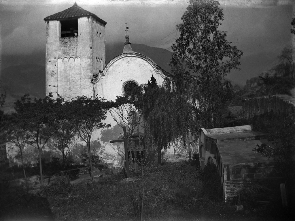 Església de Sant Julià de Montseny el 1900. Còpia moderna del negatiu original de vidre 20 x 25 cm Llegat Dolors Moros, 2010 Museu d'Art Jaume Morera, Lleida. 2751